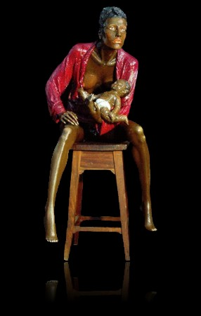 Escultura de Jorge Melicio. Mãe com Bébe ao colo.